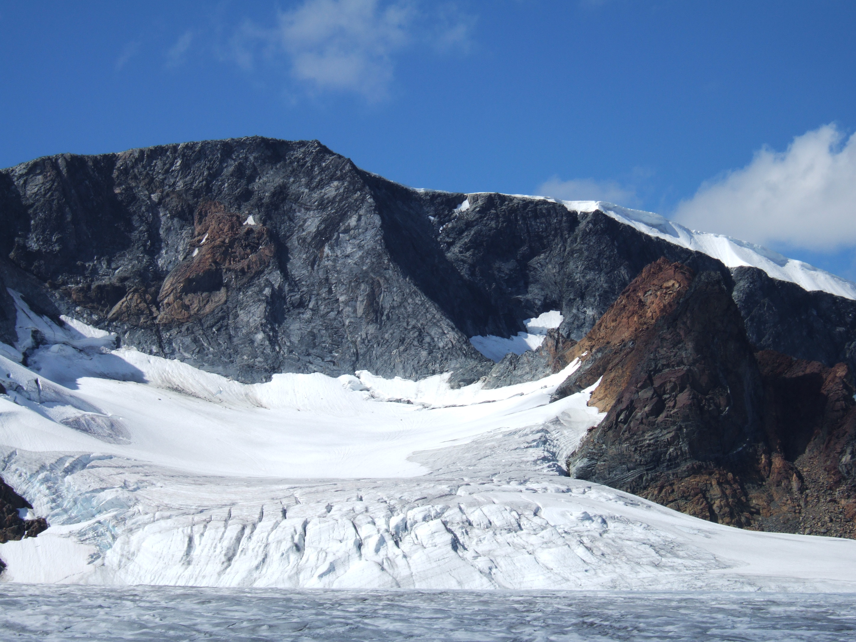 Leirhøe, sett fra Veobreen, Jotunheimen.